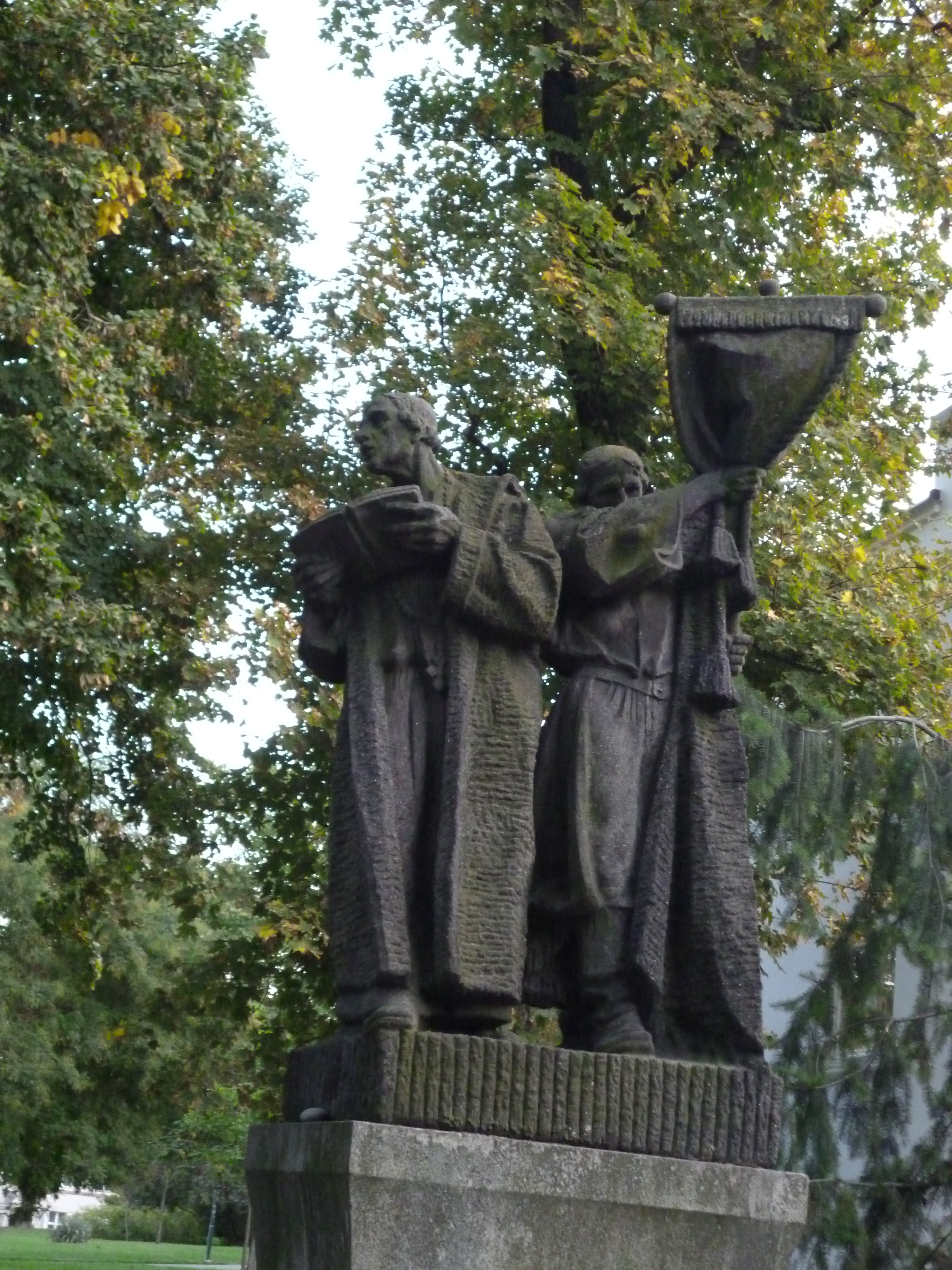 Sousoší Poutníci (Brno), Brno - město, Koliště, Brno, Franta Úprka (1915)